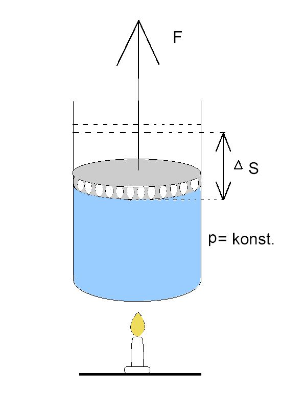 Plyn uzavřený ve válcové nádobě s pohyblivým pístem působí na píst tlakovou silou F a při zvětšování objemu koná práci.